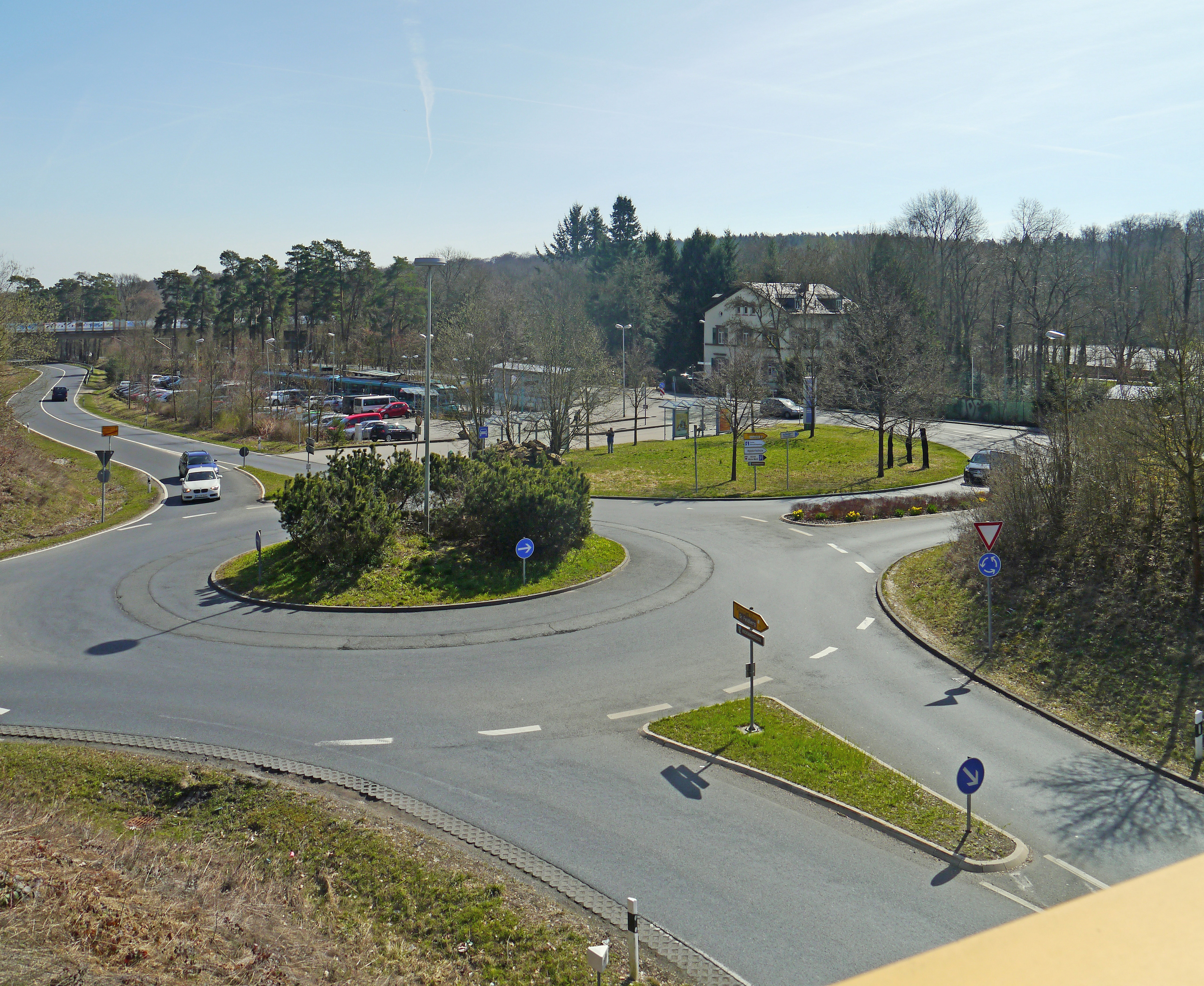 Verkehrskreisel an der Hohemark in Oberursel, Endstation der Linie U 3 und Bushaltestelle zu den Buslinien zum Feldberg und zum Hochtaunus.